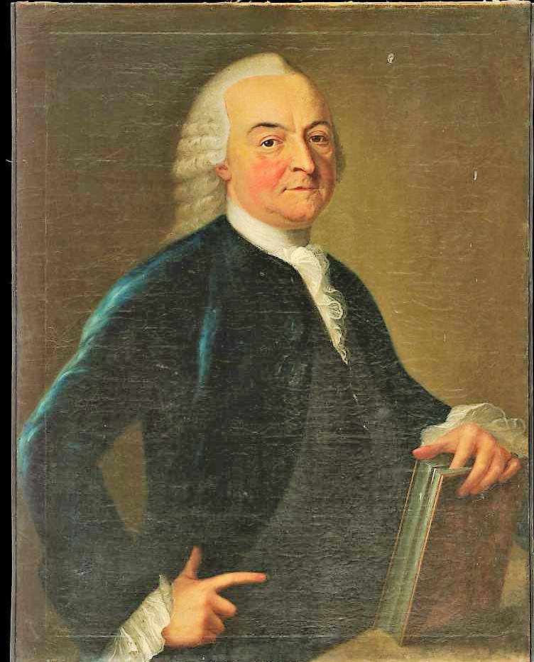 Alexander Speissegger: Heinrich Escher vom Glas, 1773? Gemälde : Öl auf Leinwand ; 98 x 75,5 cm. Zentralbibliothek Zürich, Inv 176.